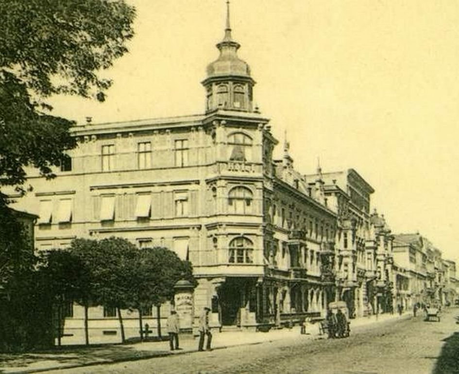 Hotel "Deutsches Haus" in der Krakauer Straße Oppeln, 1945 zerstört